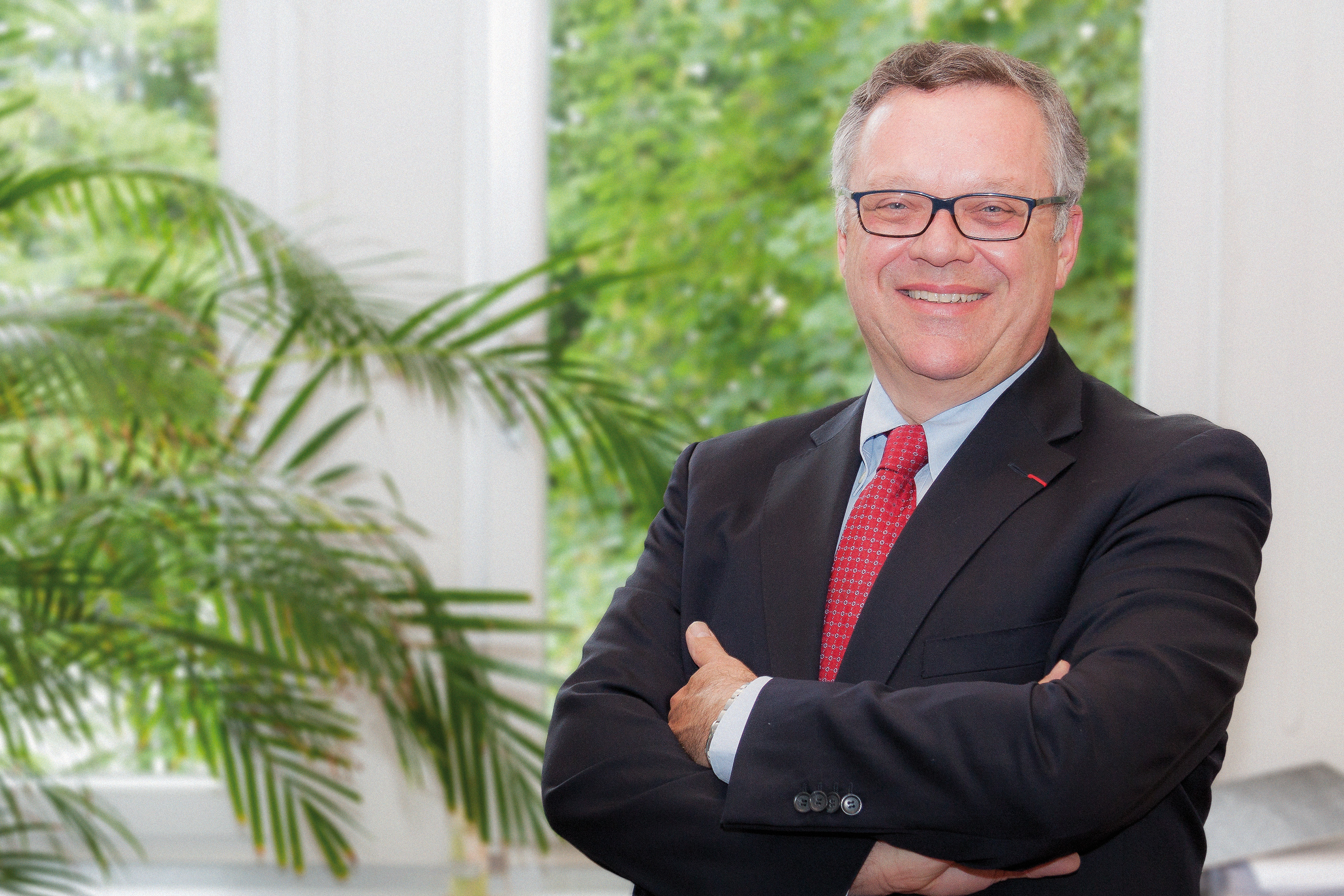 Portrait von Hanns-Christoph Eiden